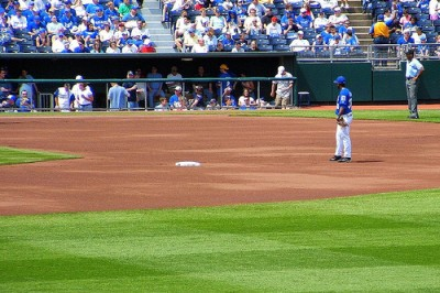 Autore: KellyK Descrizione: la seconda base del campo di baseball di Kansas City Origine: Flickr URL